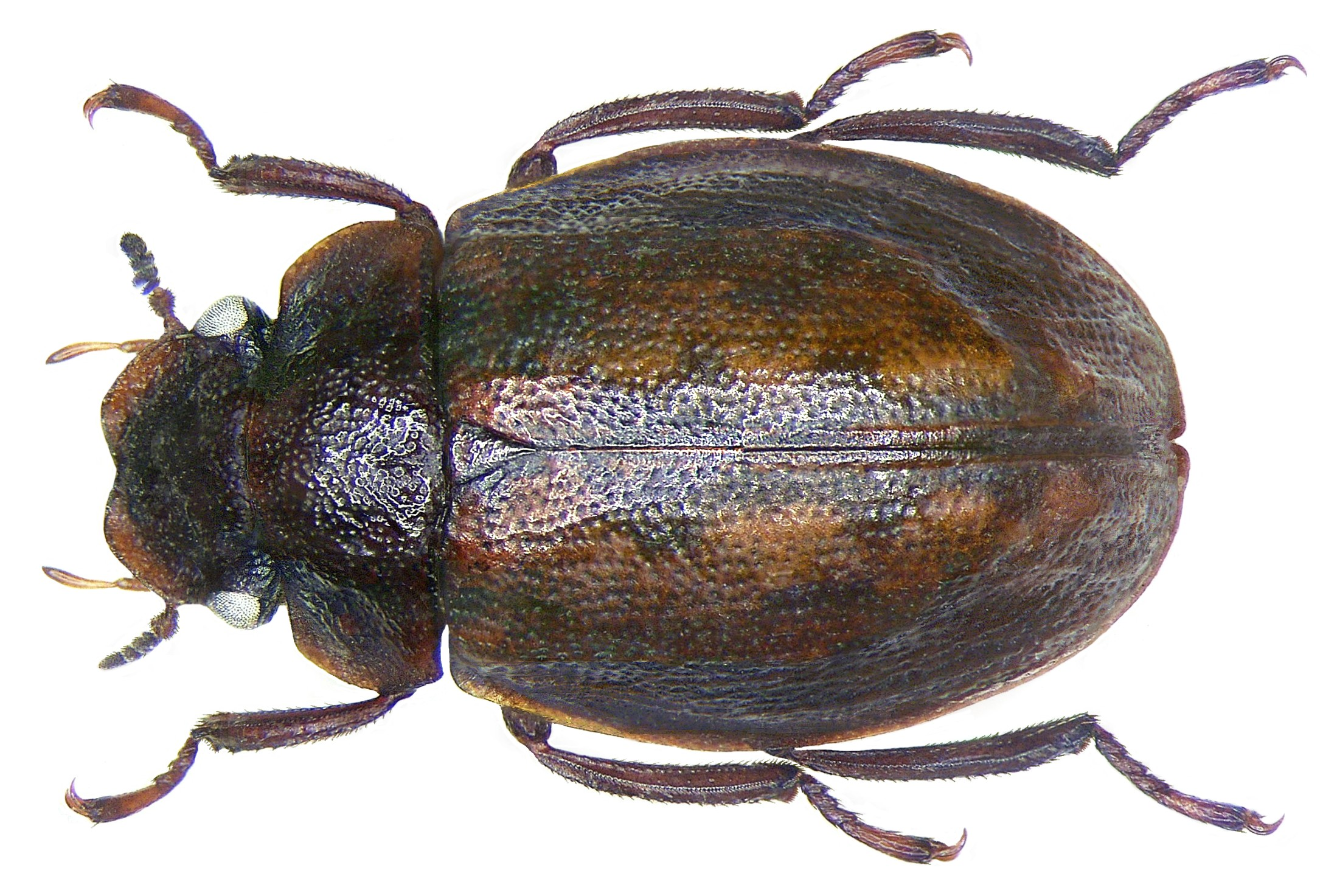 Familie: Spercheidae Grösse: 5,5-7 mm Verbreitung: Europa Ökologie: in nährstoffreichen stagnierenden Gewässern Fundort: Austria, Neusiedler See, Warmsee leg.det. U.Schmidt, 1975 Foto: U.Schmidt, 2008